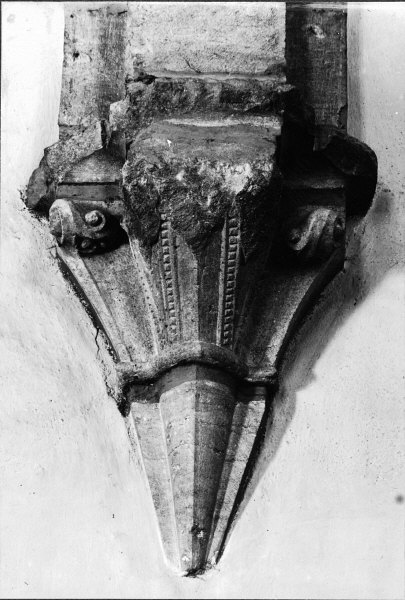 Konsol i södra långhusmuren. Kategori: (02) Interiörer, detaljer Konsol i södra långhusmuren.